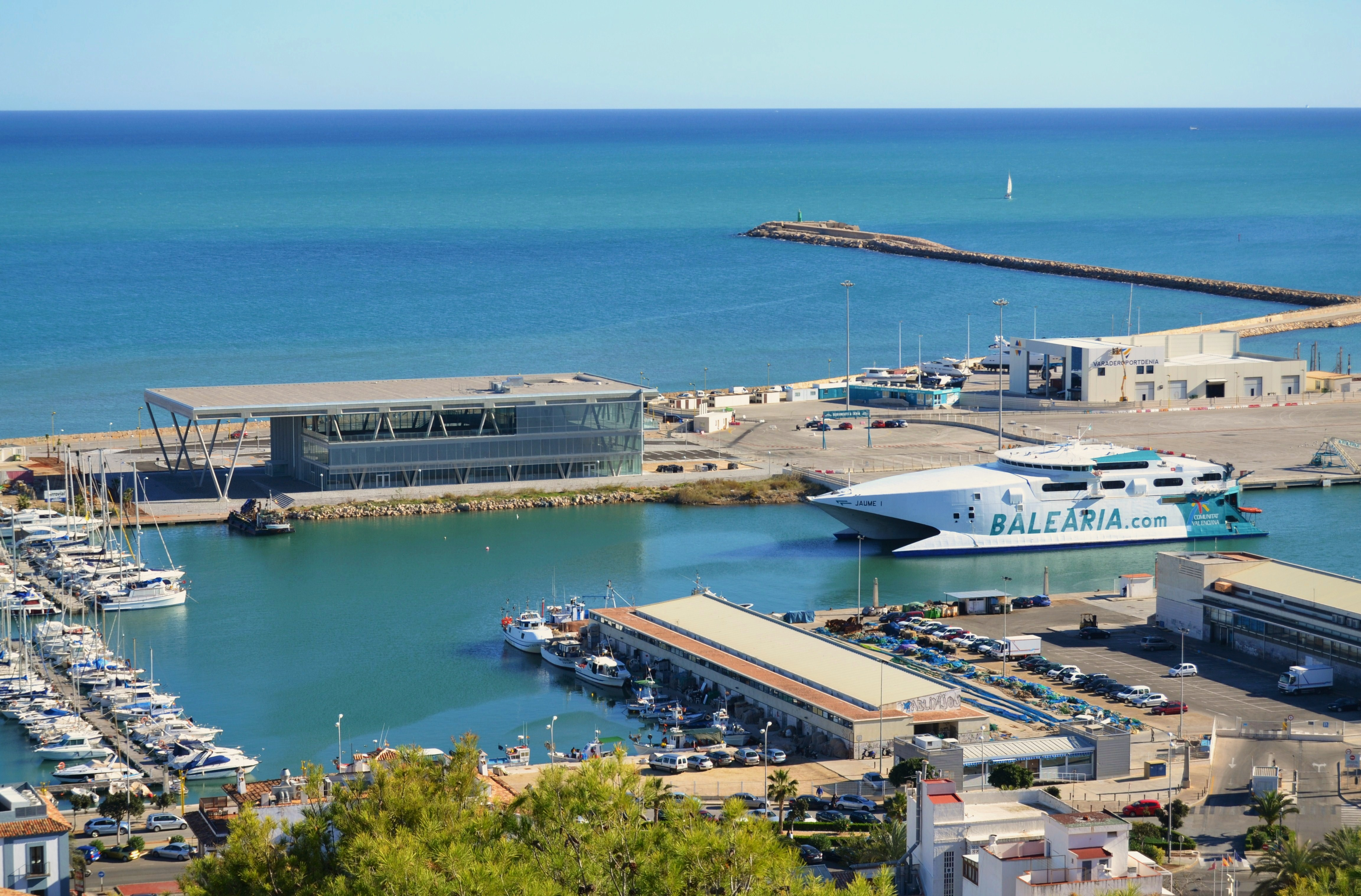 Port de Dénia i terminal de passatgers.